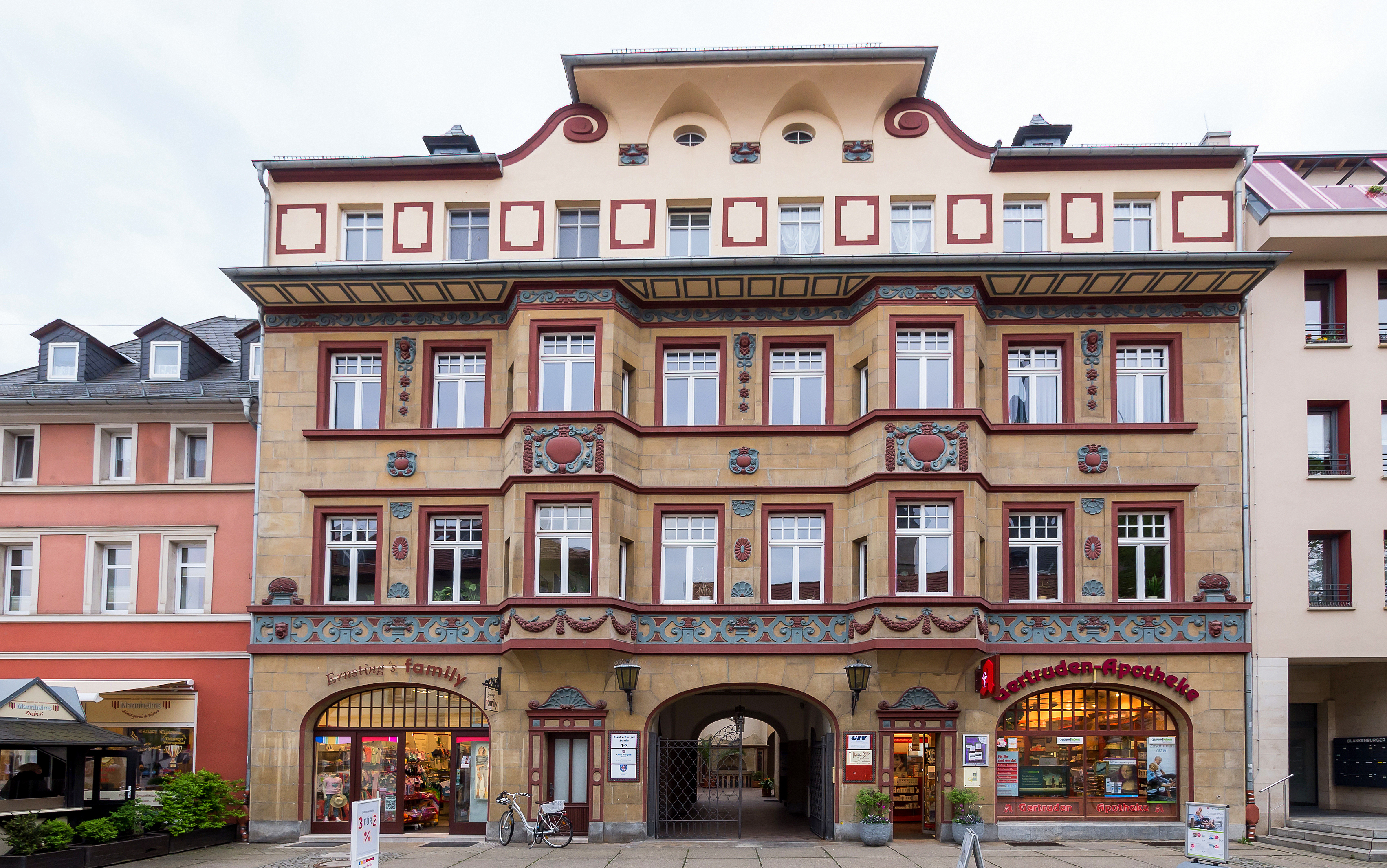 Saalfeld Blankenburger Straße 1-3 I